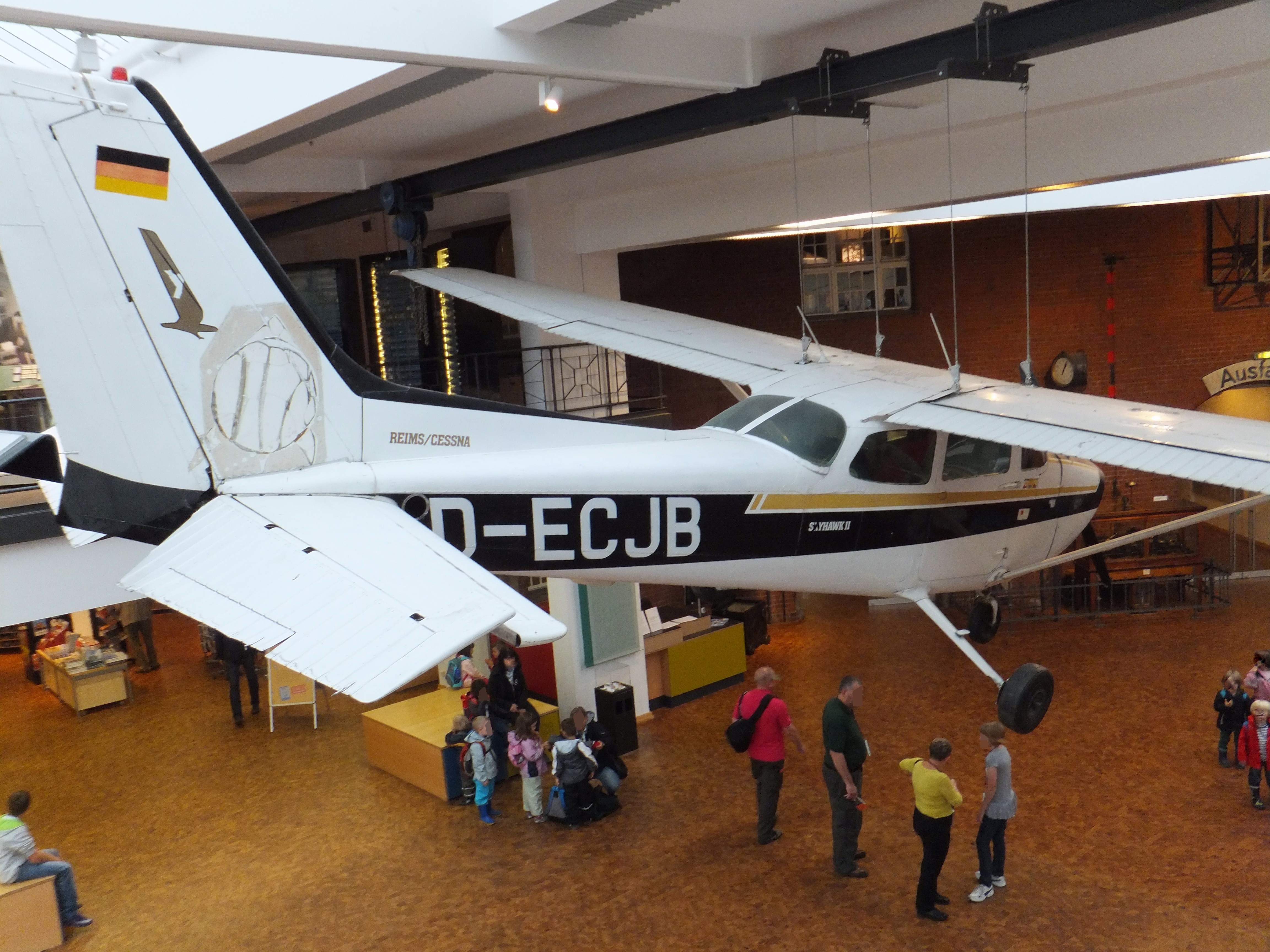 Dies ist das originale Flugzeug des Typs Reims Cessna 172P, welches durch Mathias Rust 1987 auf einer Brücke unweit des Roten Platzes in Moskau landete. Damals war Rust 18 Jahre alt. Man spricht bei dieser Maschine auch von der wahrscheinlich bekanntesten auf der Welt, die dem Typ Cessna angehören.